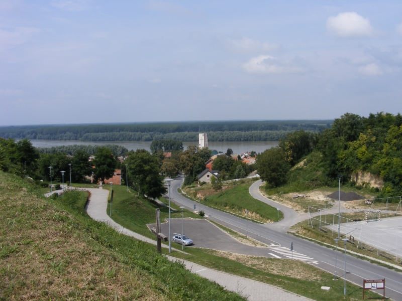 Pogled s kalvarije u Aljmašu